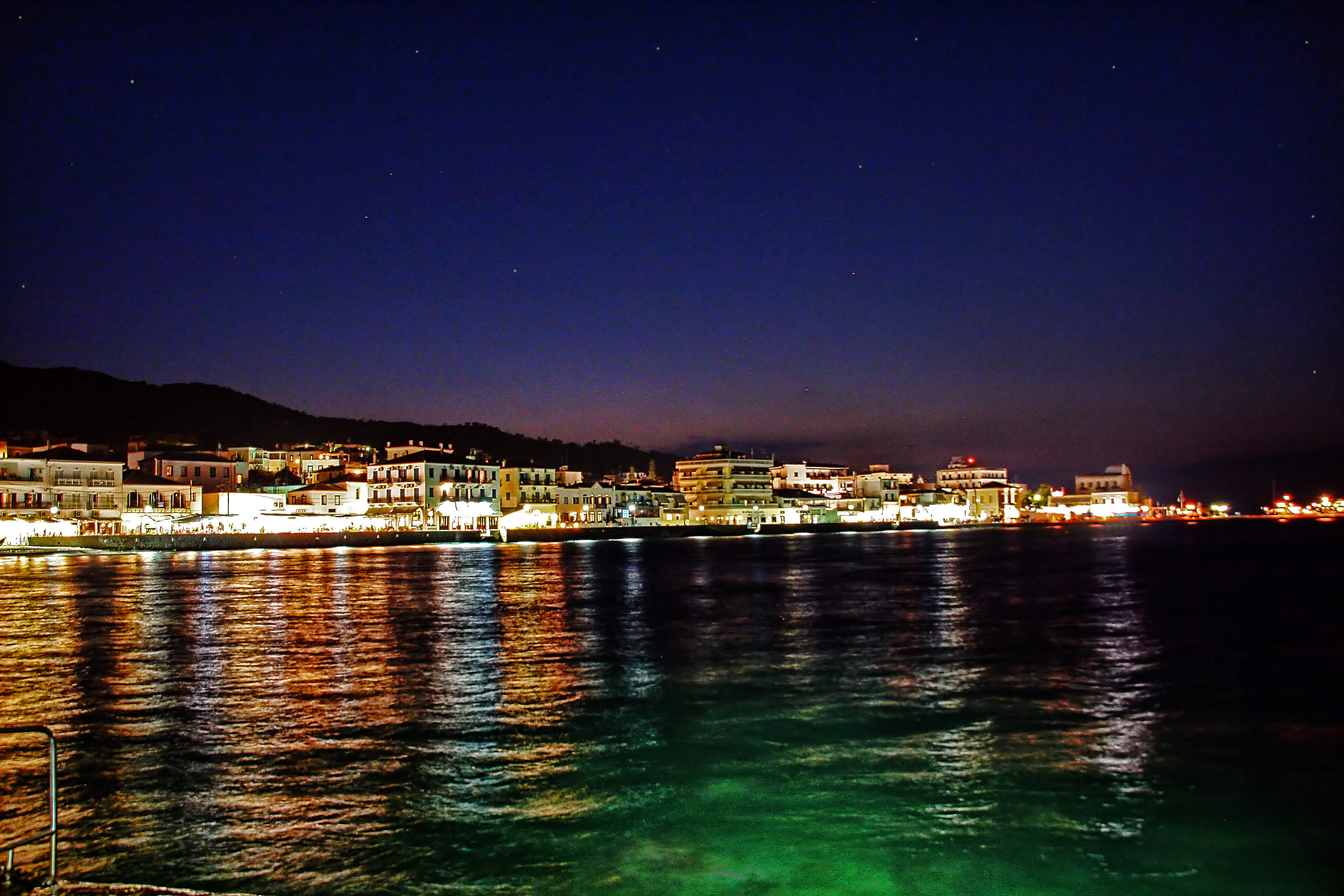 Spetses5